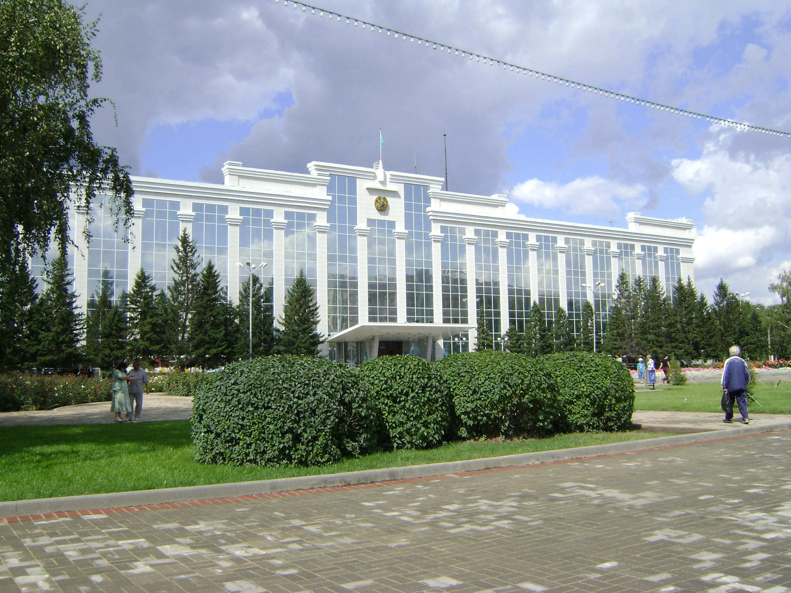 Здание областного акимата. Усть-Каменогорск